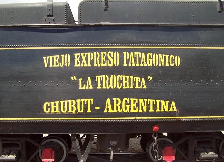 Nombre completo, oficial y popular, en la carbonera de La Trochita.